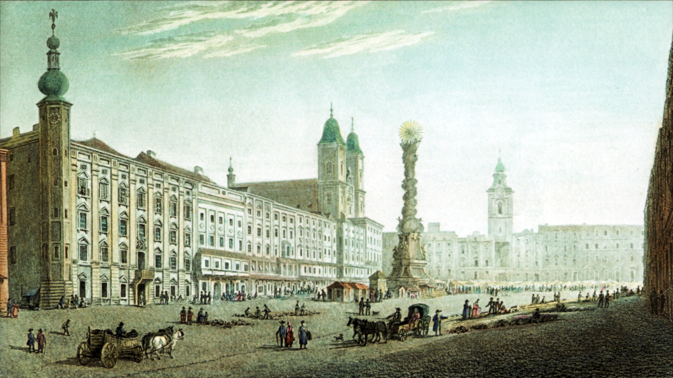 Der Linzer Hauptplatz im Jahr 1821. Rechts der Dreifaltigkeitssäule ist noch der 1828 abgetragene Schmidtorturm zu sehen. Farblithografie nach einer Zeichnung Robert Battys